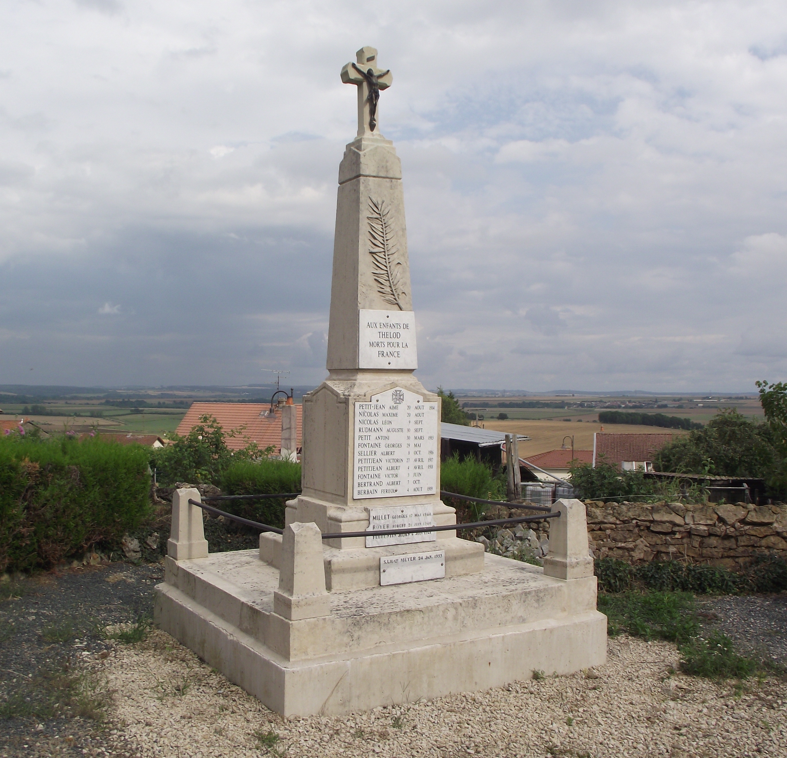 Monument aux Morts à Thelod, il est situé près de l'église.